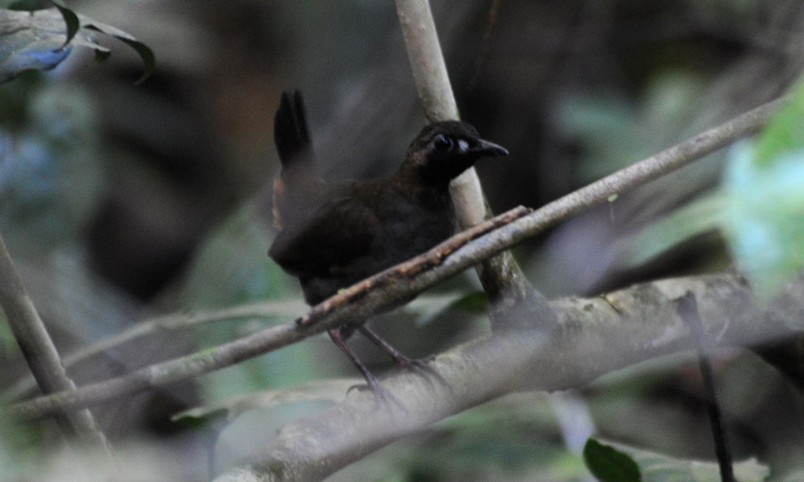 Tétéma coq-de-bois (Formicarius analis)